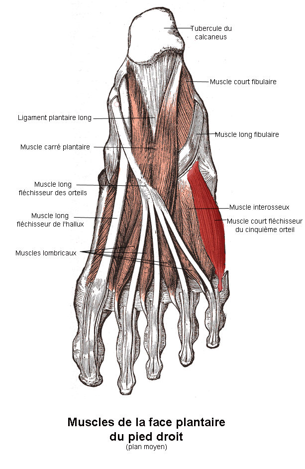 Muscle court fléchisseur